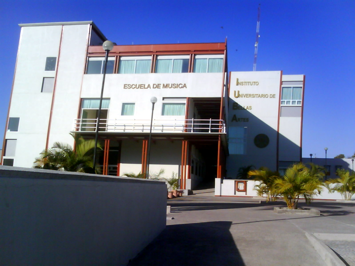 Instituto Universitario de Bellas Artes (IUBA) de la ciudad de Colima.